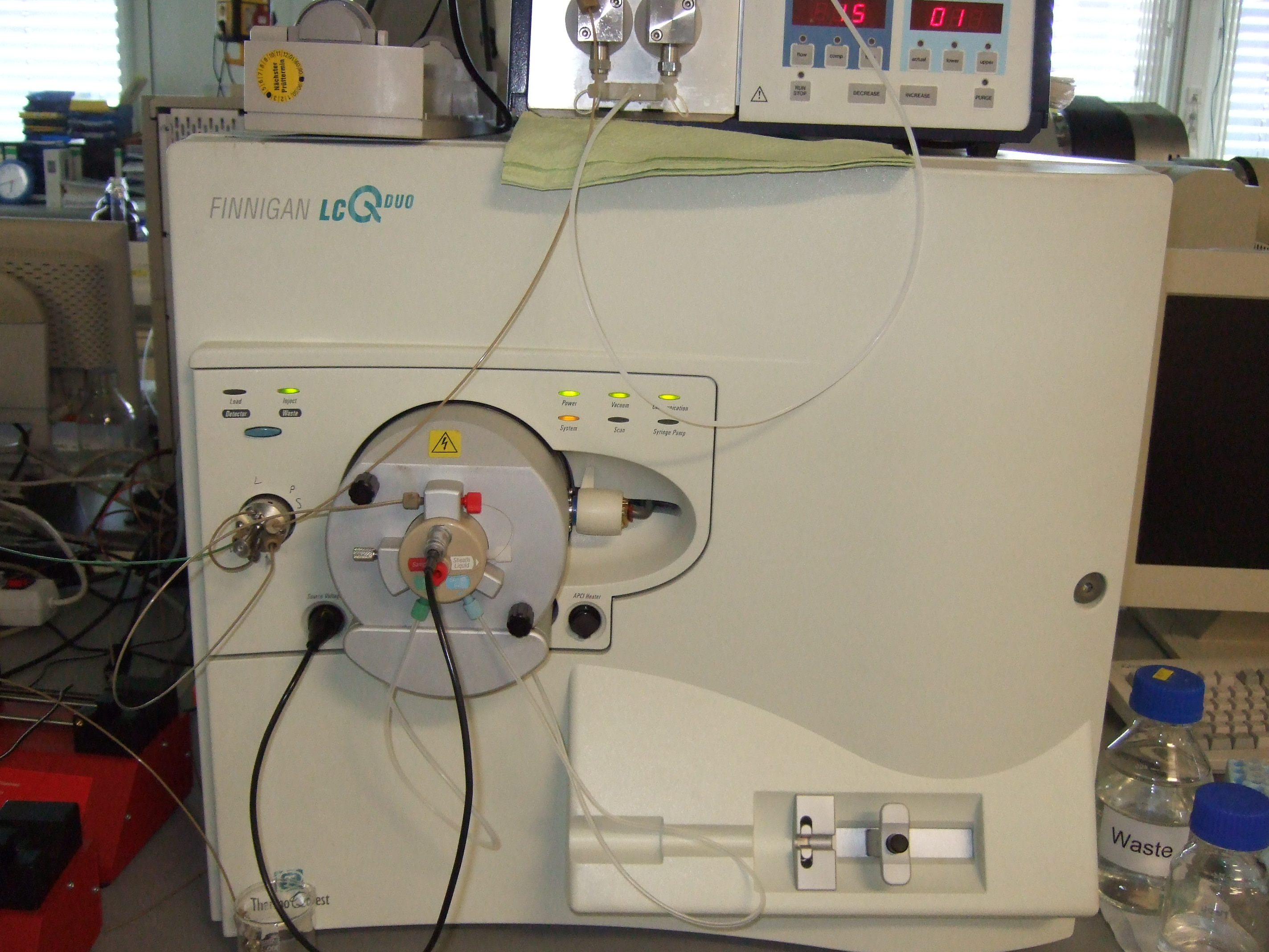 Iontrap